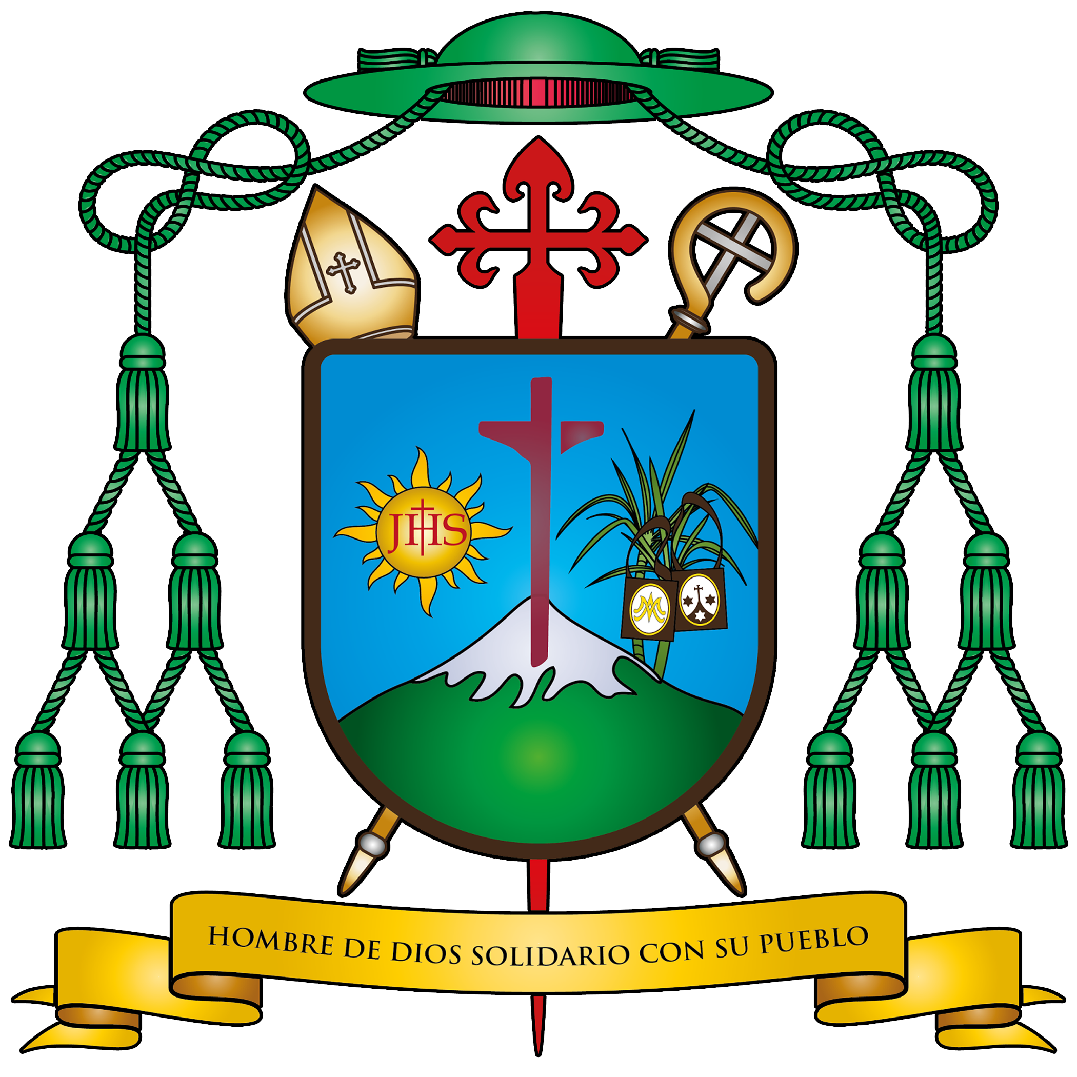 Escudo episcopal de Alfredo Enrique Torres Rondón